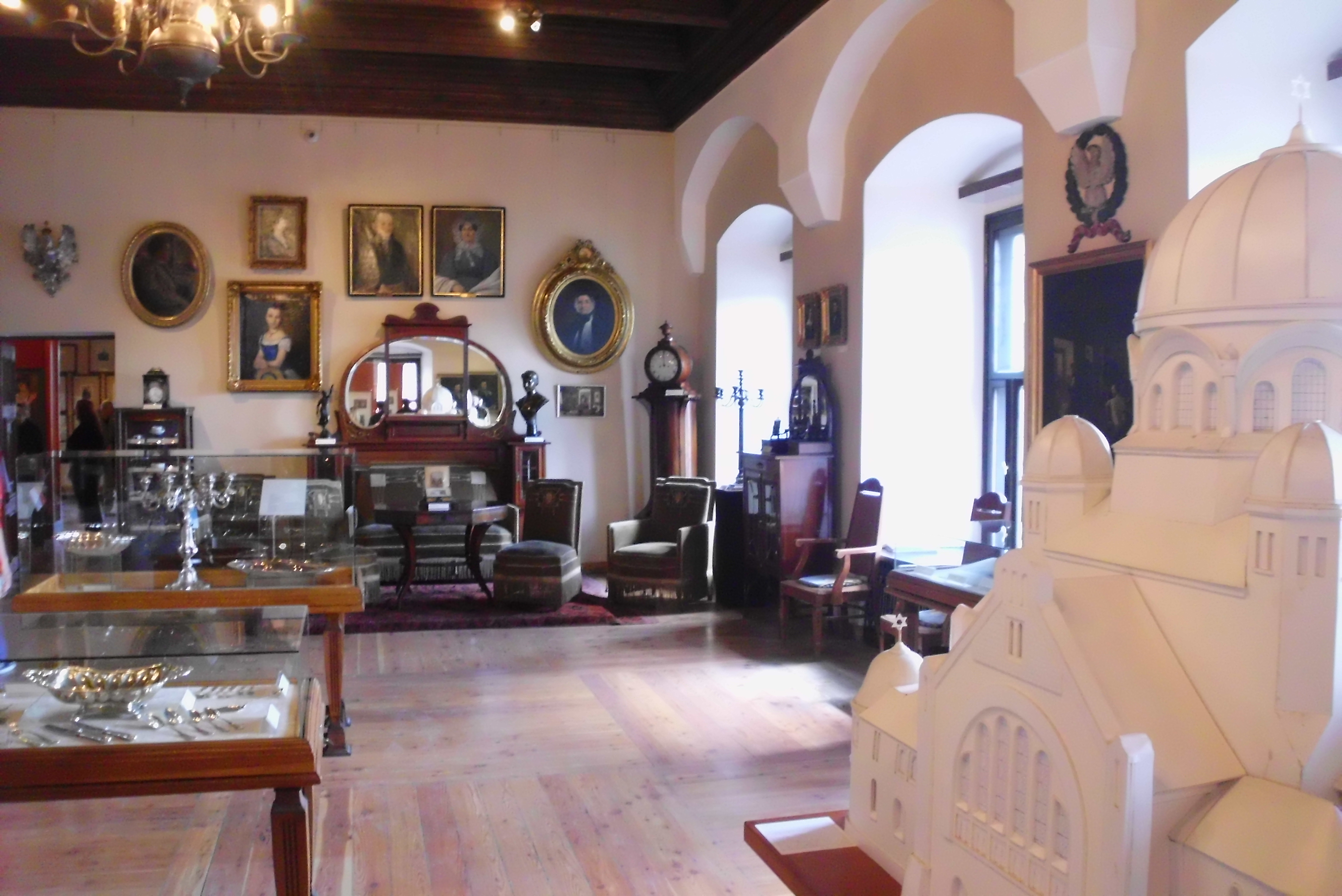 Model Nowej Synagogi w Poznaniu na wystawie w sali Królewskiej poznańskiego ratusza - maj 2015